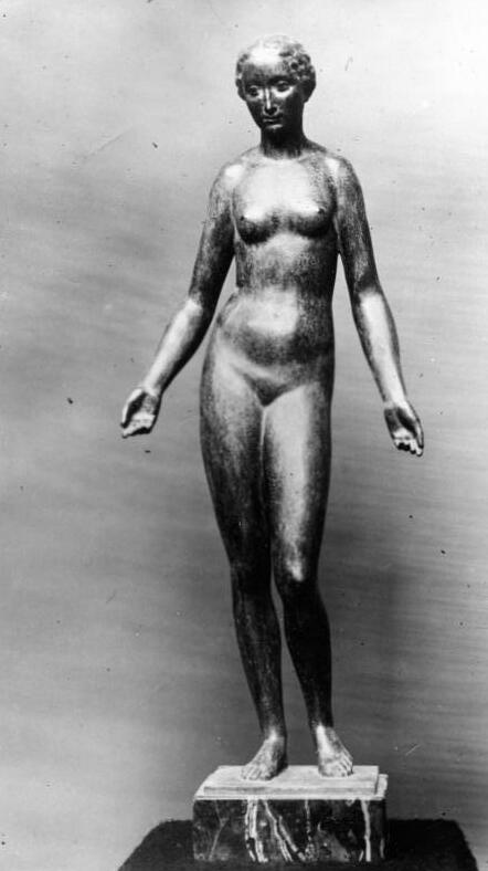 "Schönheit" von Prof. Fritz Röll "Schönheit" von Professor Fritz Röll. Material: Bronze, modelliert 1926. Fritz Röll stellt die "Schönheit" in dieser Bronze dar. J.-Nr. 5516/35 Nr. 86/84